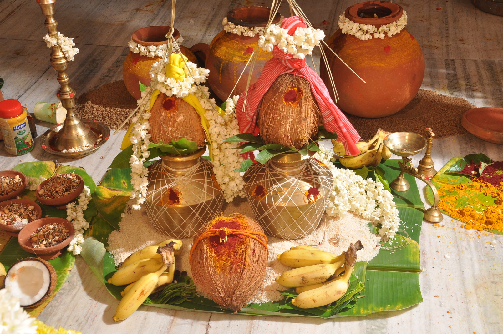 Holy Stuff being worshiped on marriage time